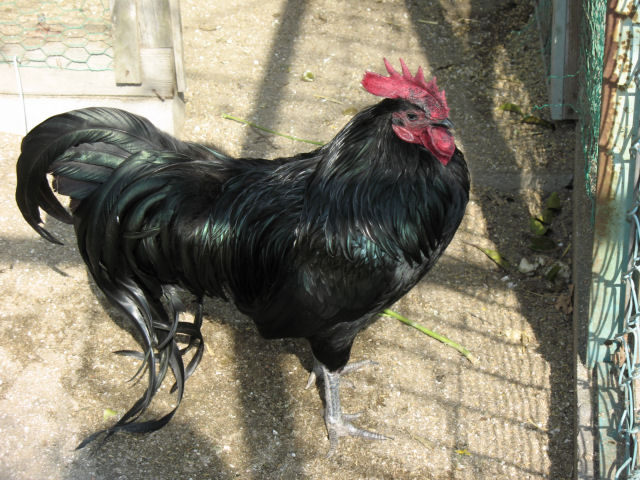 Kurokashiwa